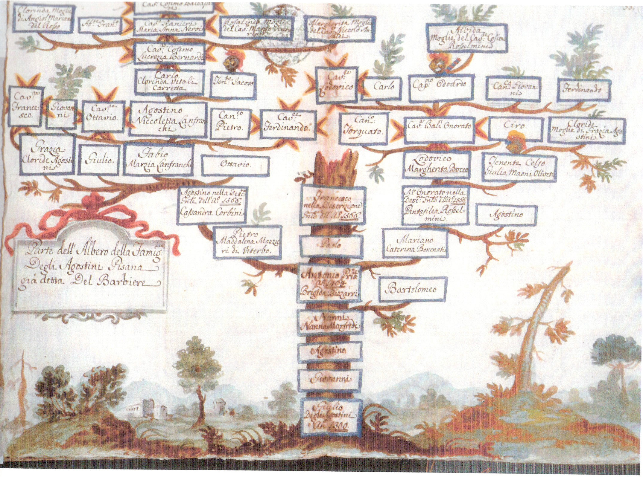 Agostini - albero genealogico per provanze nobiltà nel Granducato di Toscana - 1750